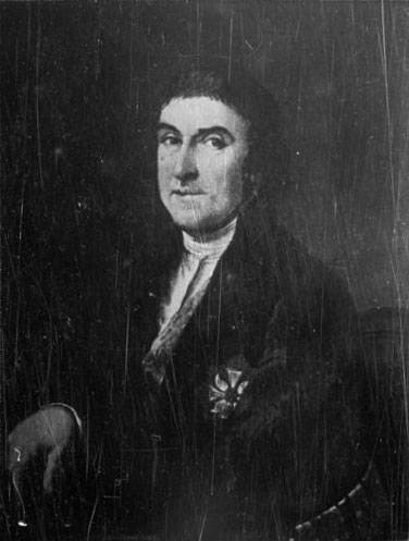 Беларуская (тарашкевіца): Марцін Грахольскі